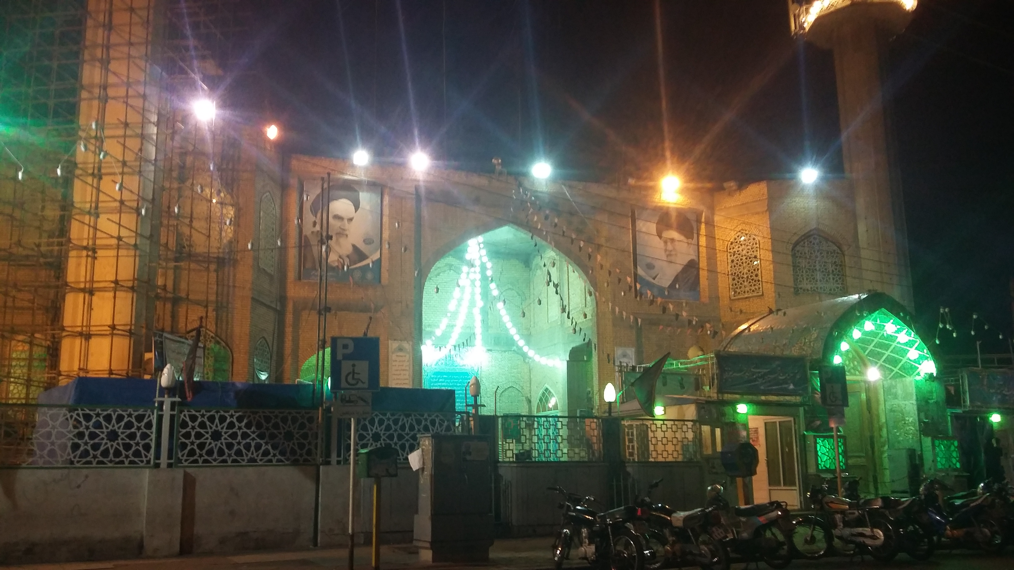 بقعه سبزقبا، آرامگاه محمد بن موسی الکاظم